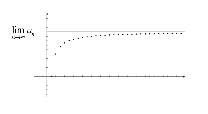 Konvergencia